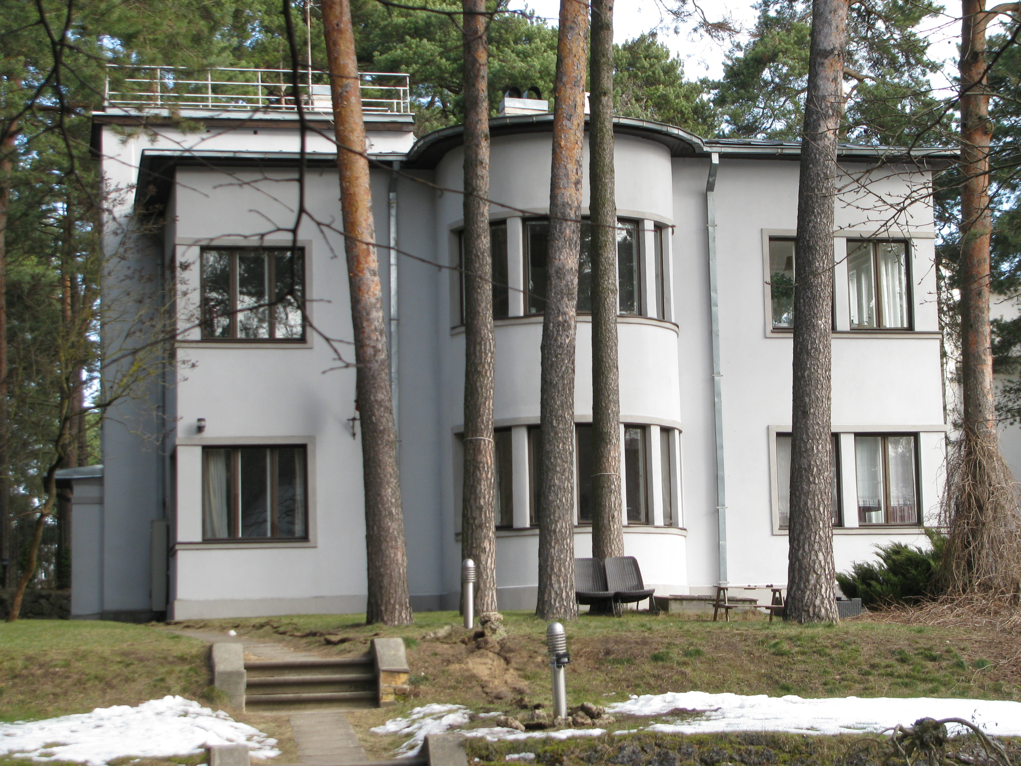 Savrupmāja, Ziemeļu rajons, Viļa Olava iela 12